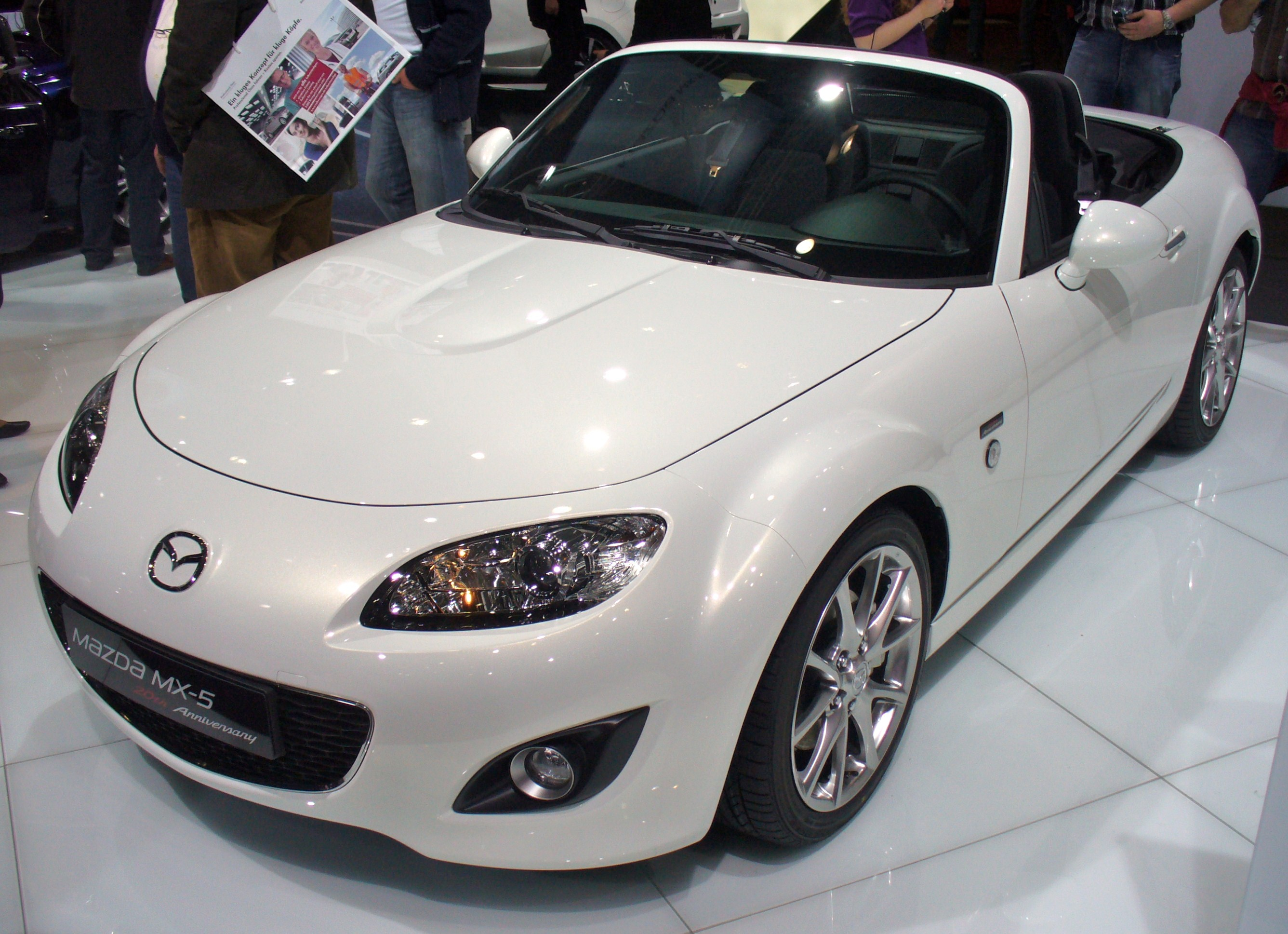 Mazda MX-5